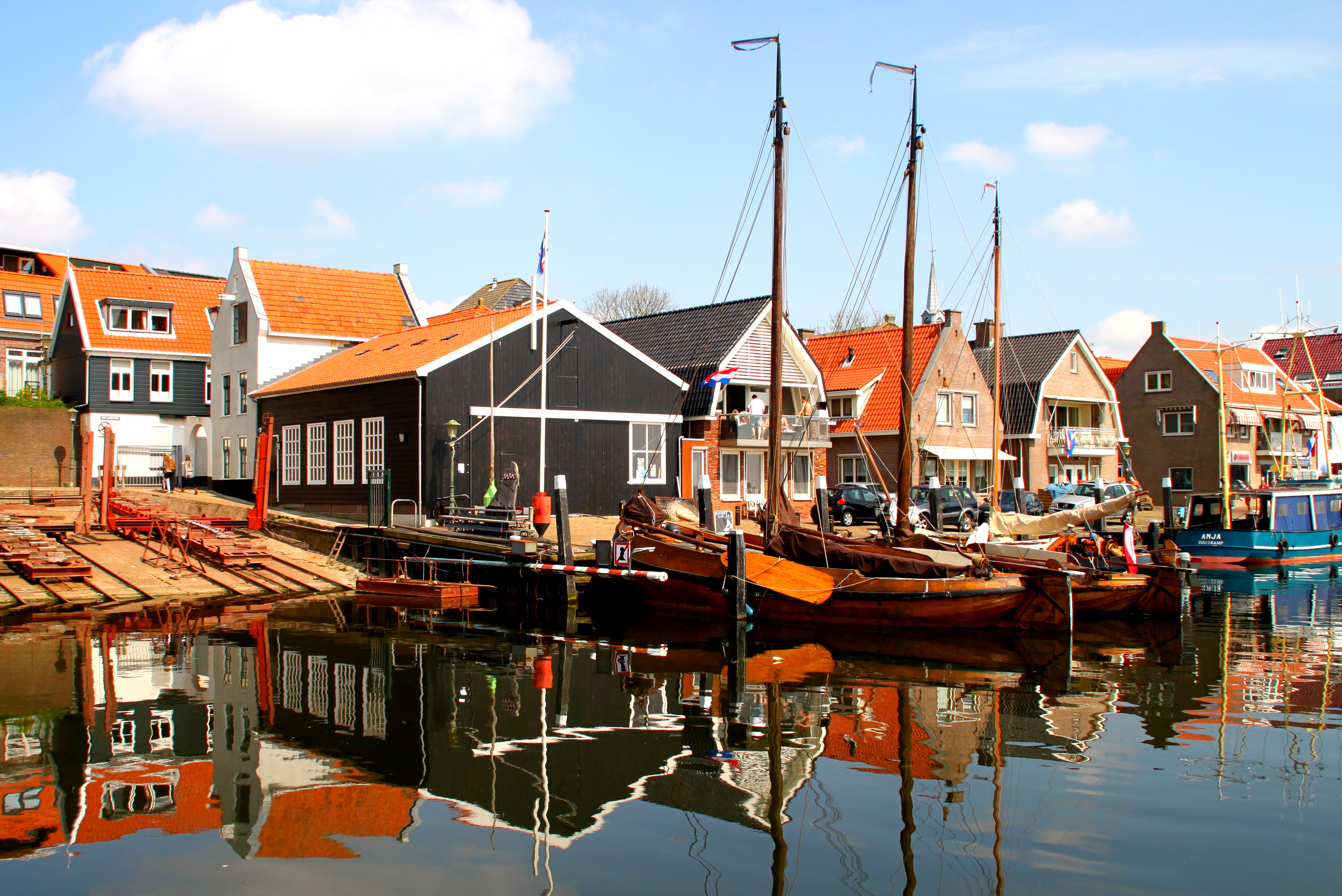 Urk - Botterschuur - haven Urk - 2014